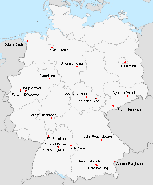 Liste des participants à la Liga 3 2008-2009